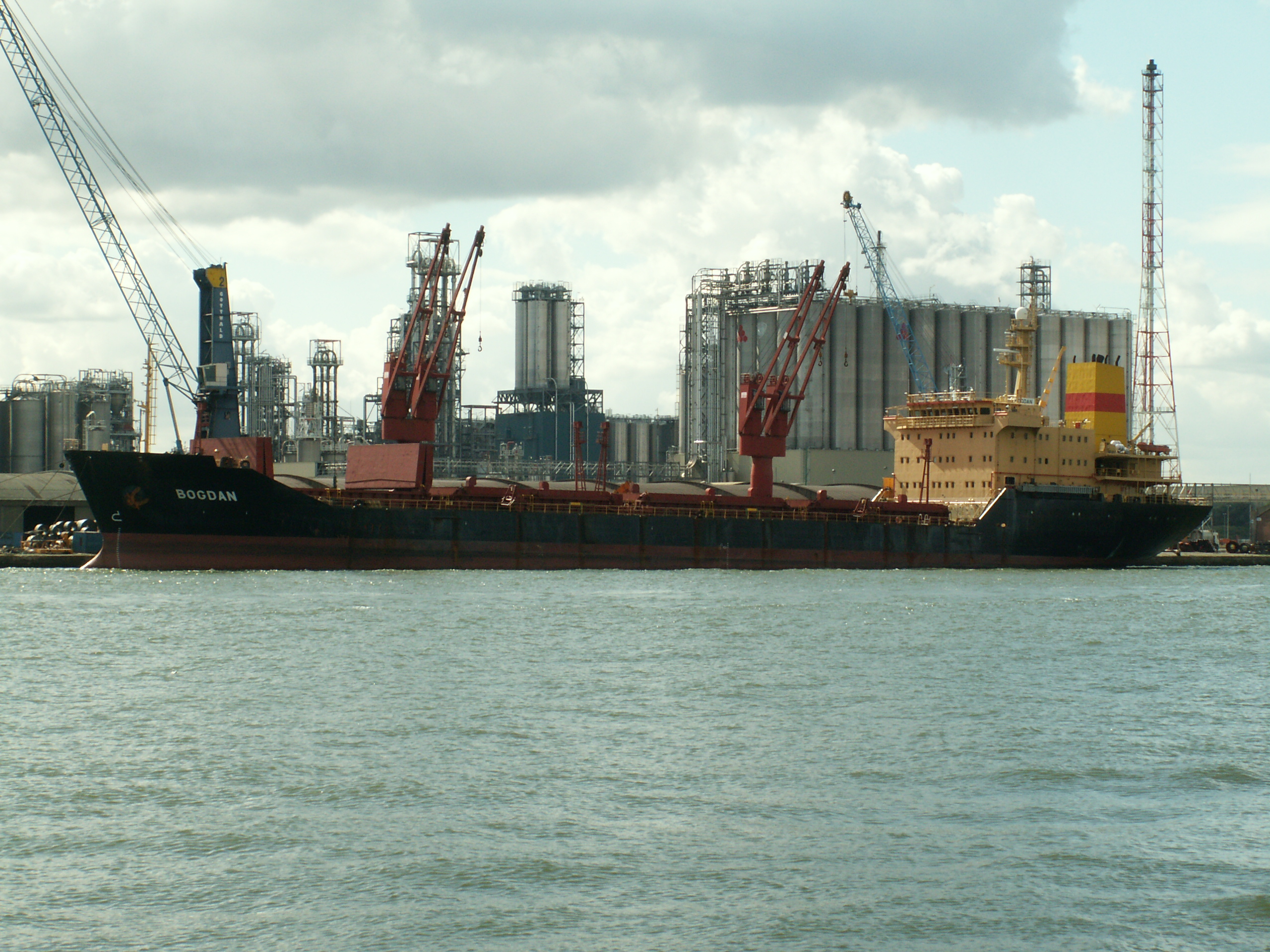 Bogdan - IMO 9132492